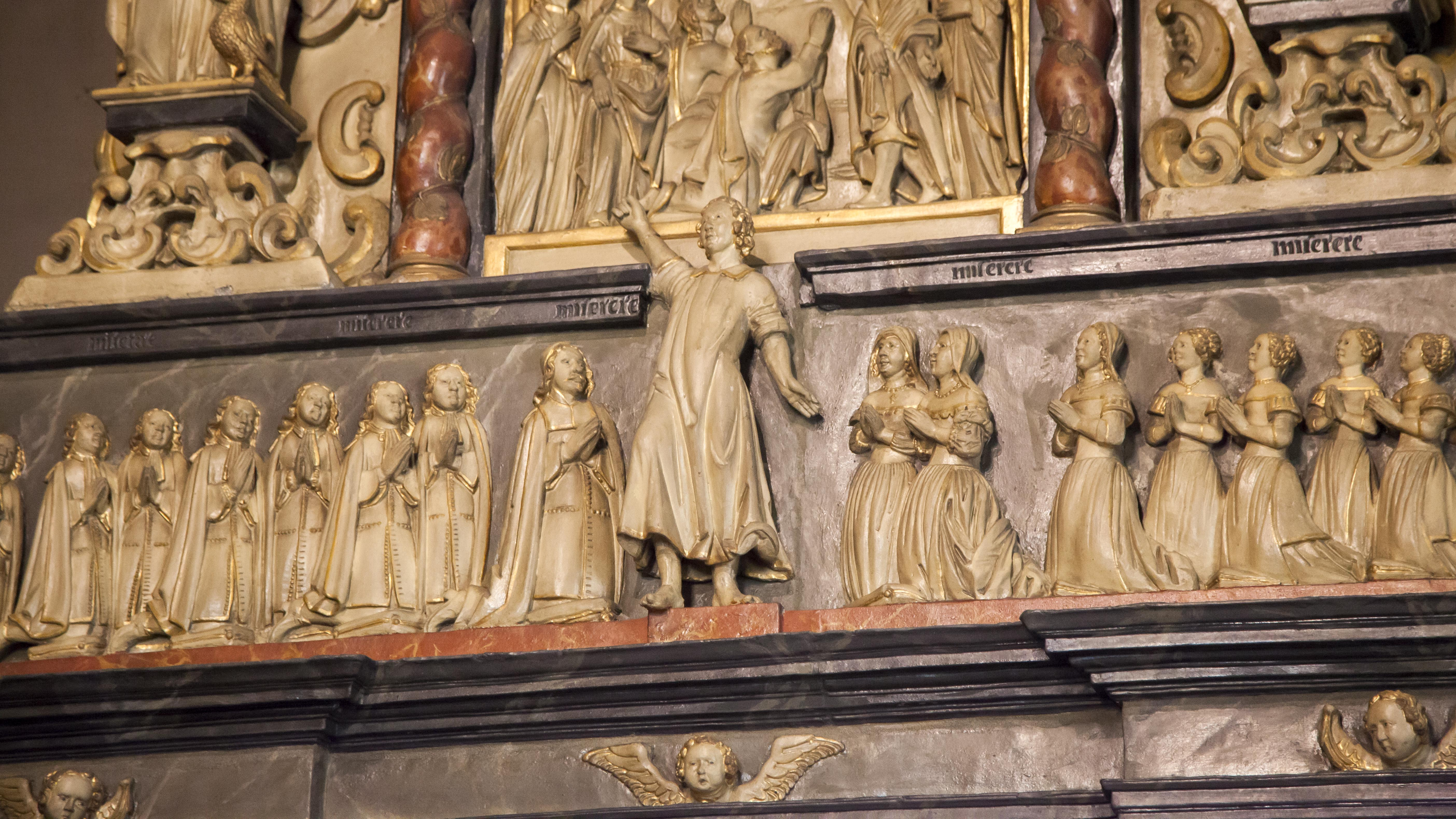 Bönkerskapelle Rheine - Stifterfamilie 2